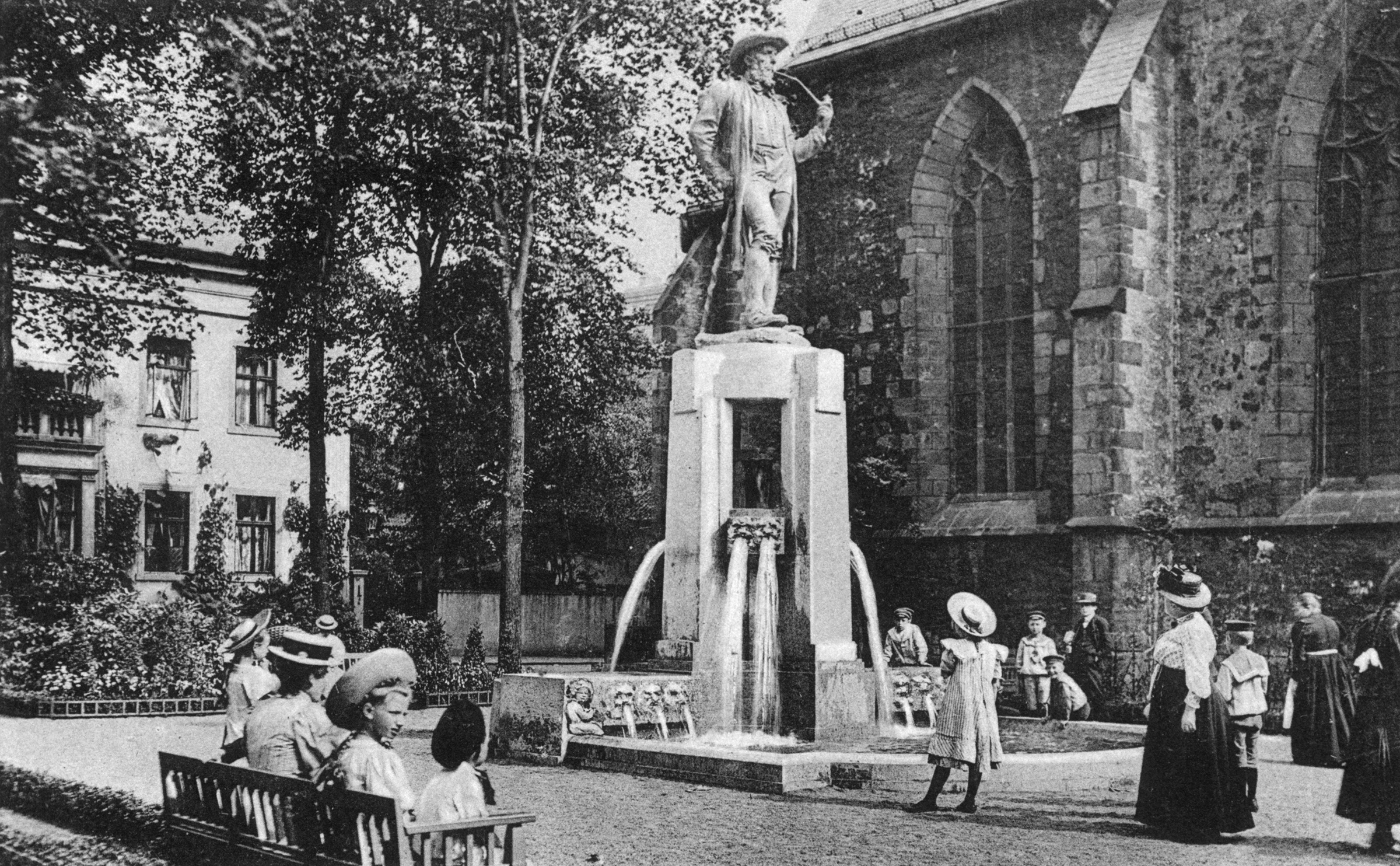 Leineweberbrunnen Bielefeld in ursprünglicher Form am alten Standort von 1909